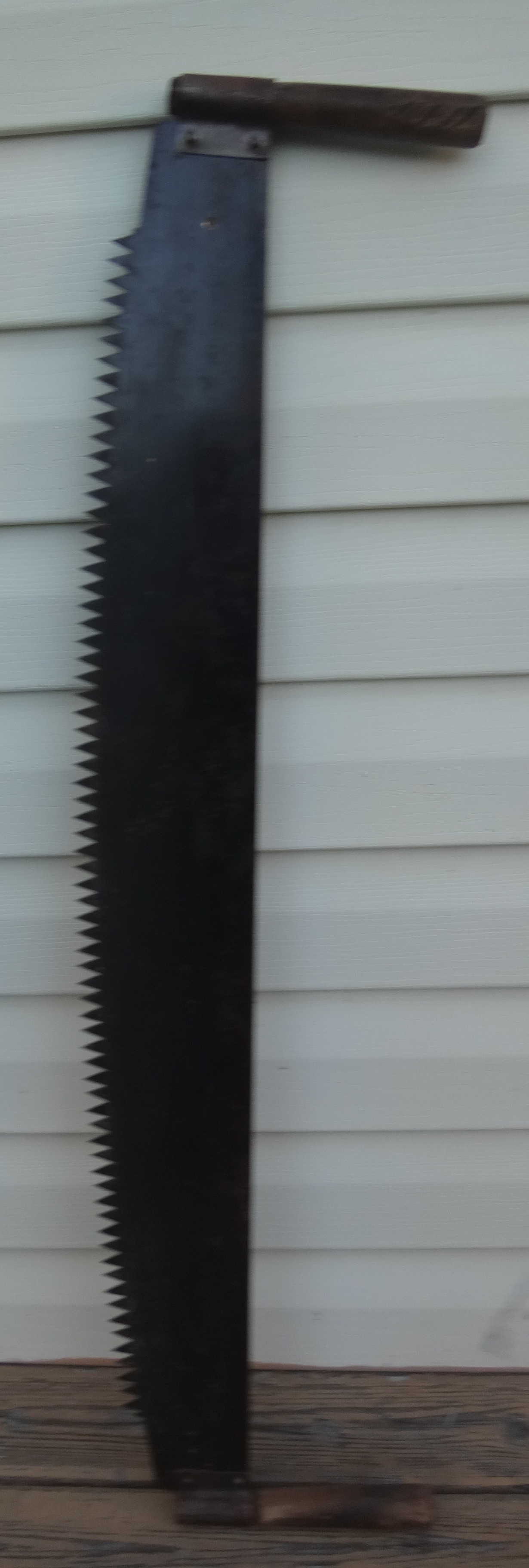 Двуручная пила